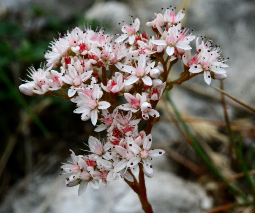 Sedum album